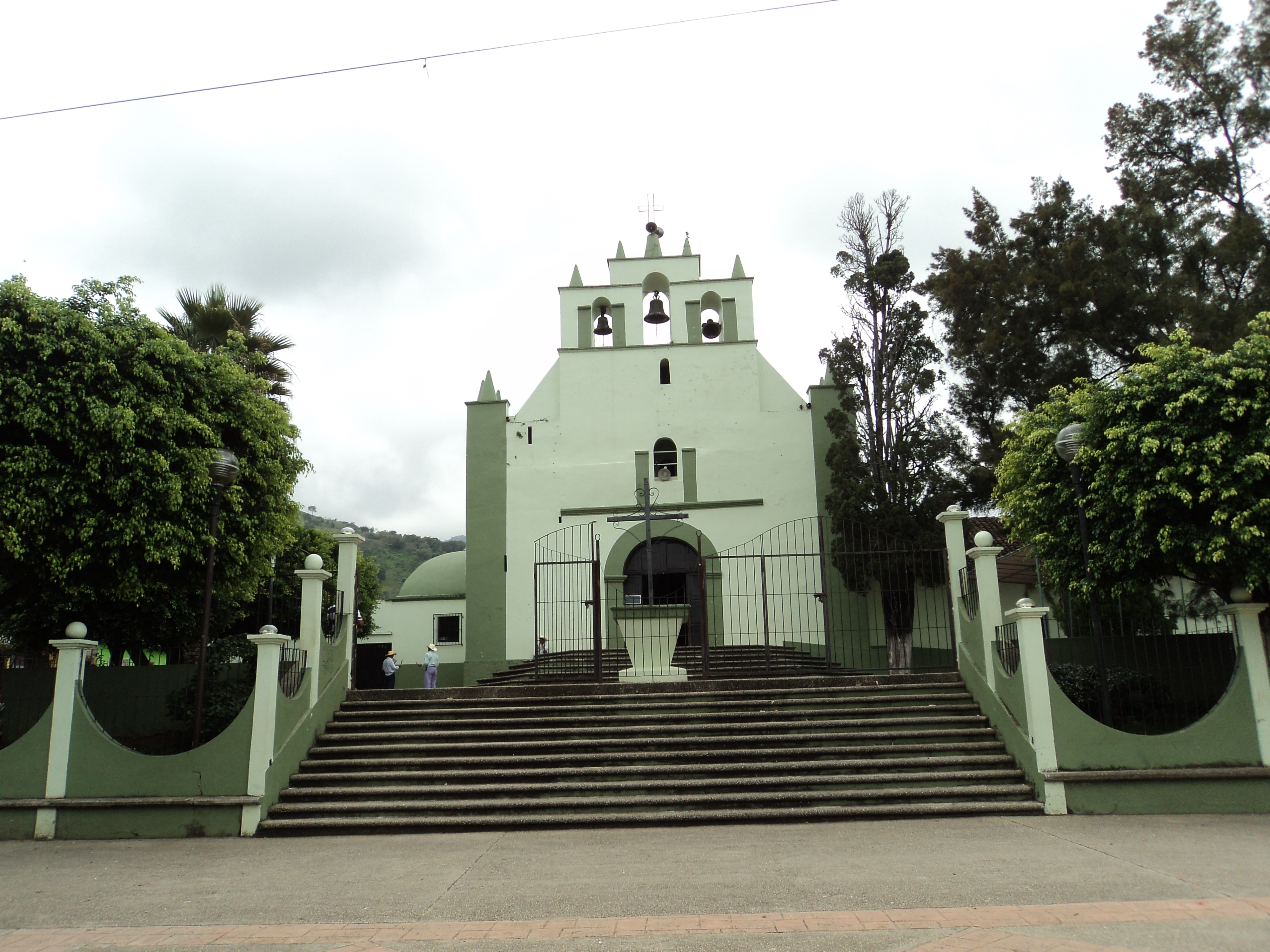 ESTE TEMPLO SE UBICA EN EL CENTRO DE VILLA LAS ROSAS, CHIAPAS